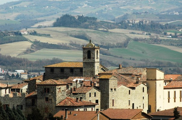 Vista di Fratta Todina